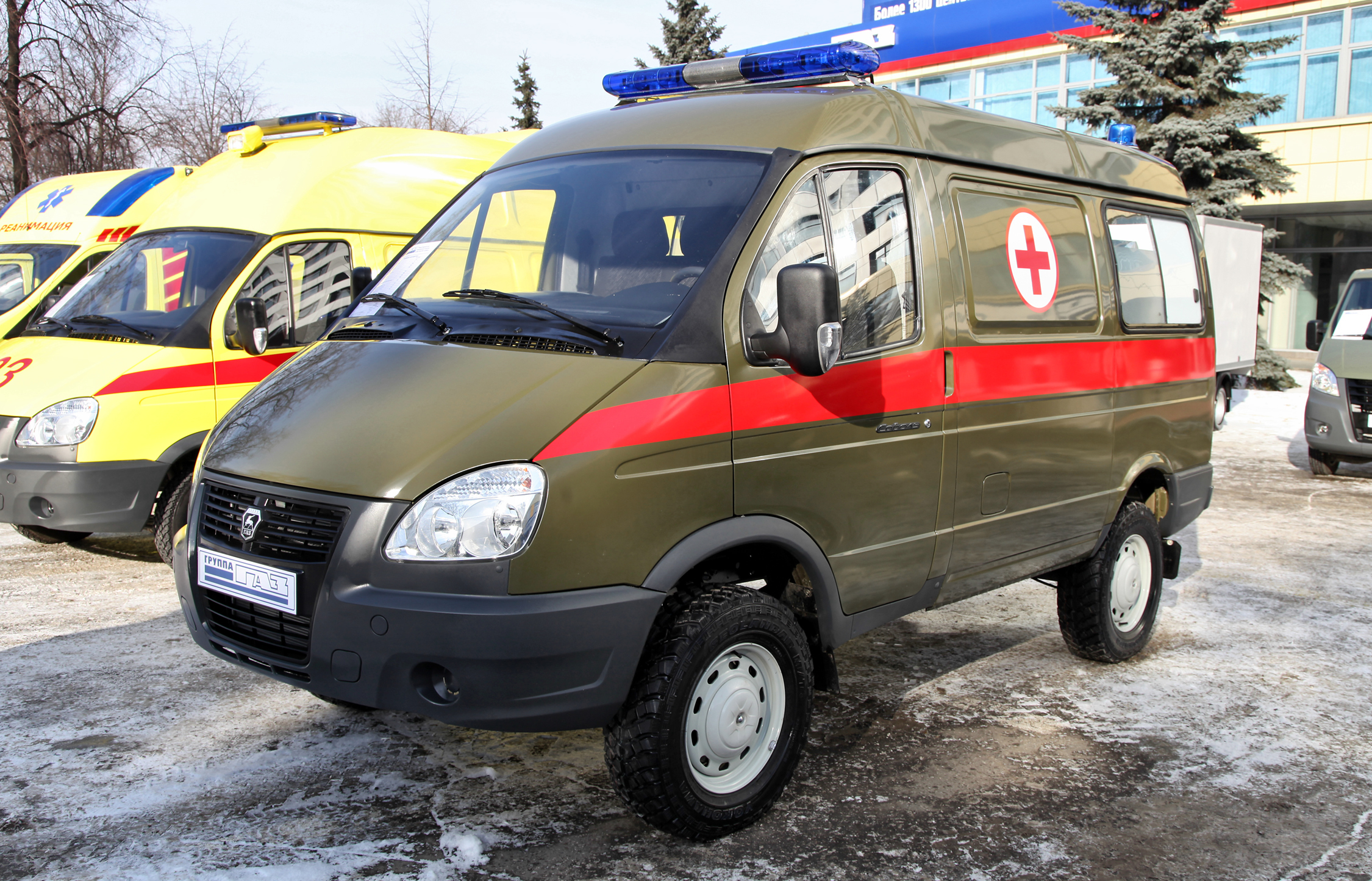 Малый медицинский эвакуационный комплекс на базе ГАЗ-27527 Соболь (Medic vehicle pn GAZ-27527 Sobol base)